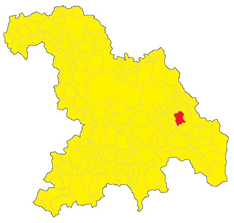 Mappa del comune di Avolasca (AL).